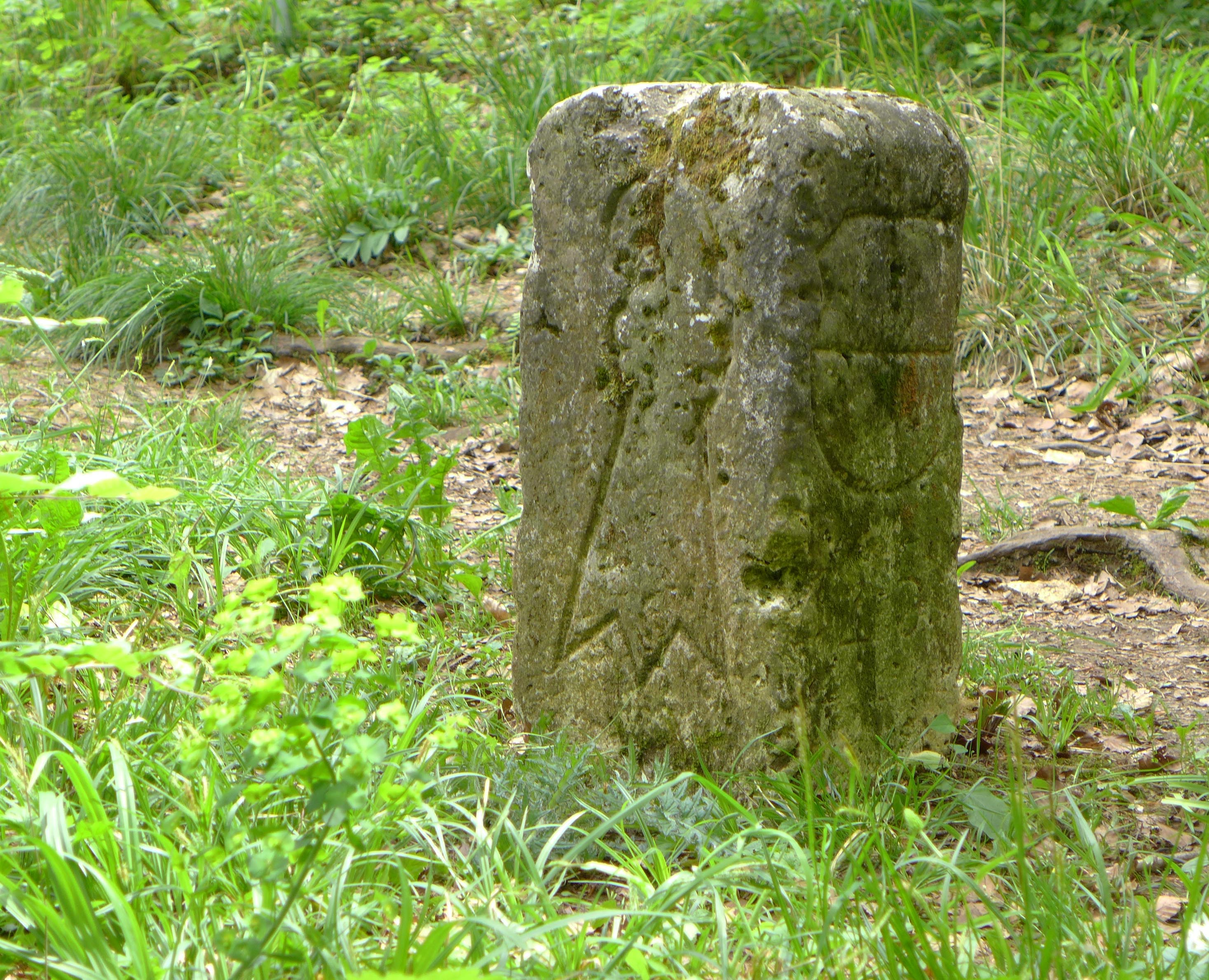 Grenzstein in der Schweiz